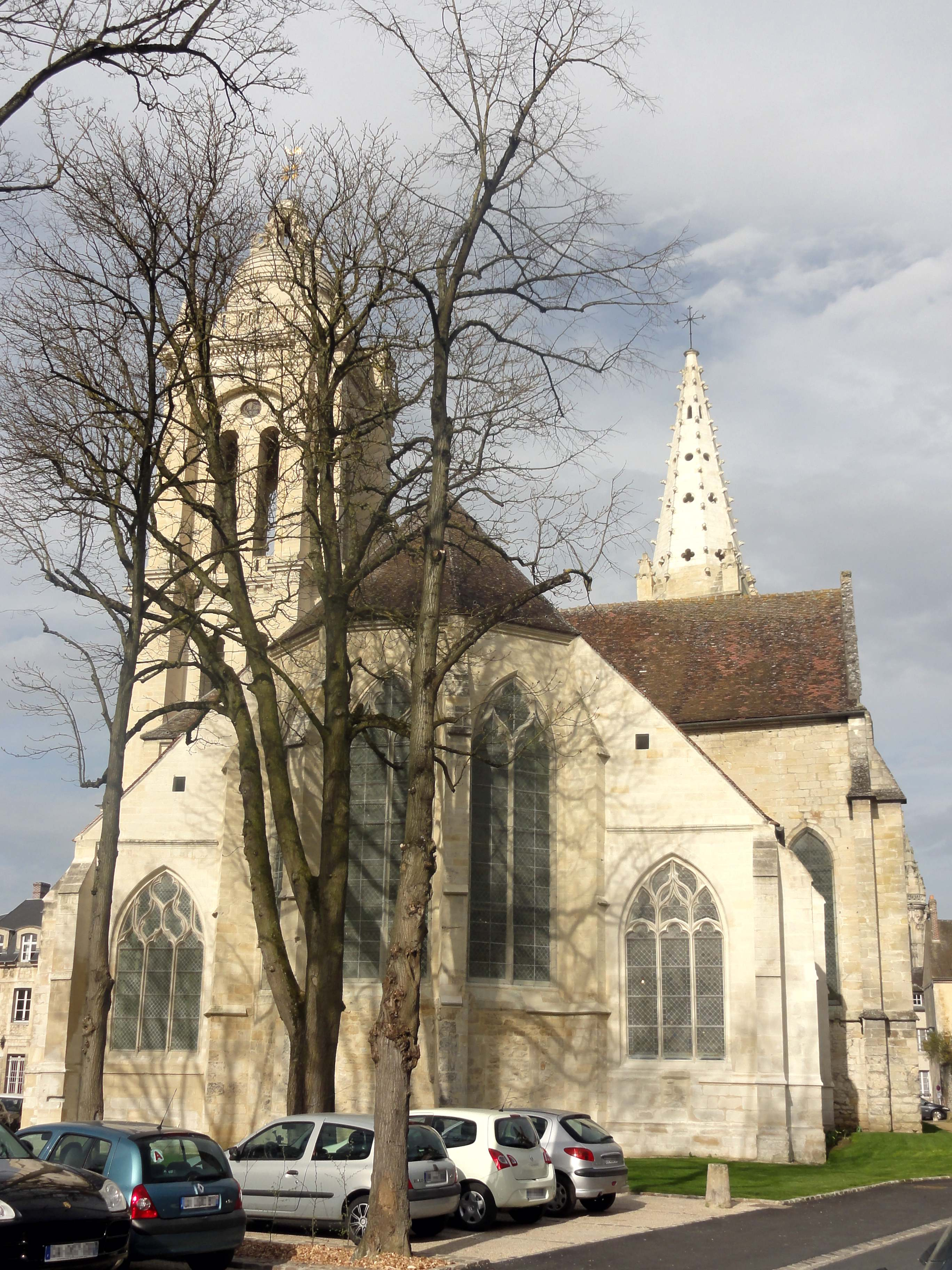 Église Saint-Pierre de Senlis - voir titre.